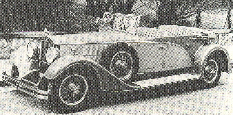 Gräf & Stift SP 8 Sports Phaeton 4 doors (1935)